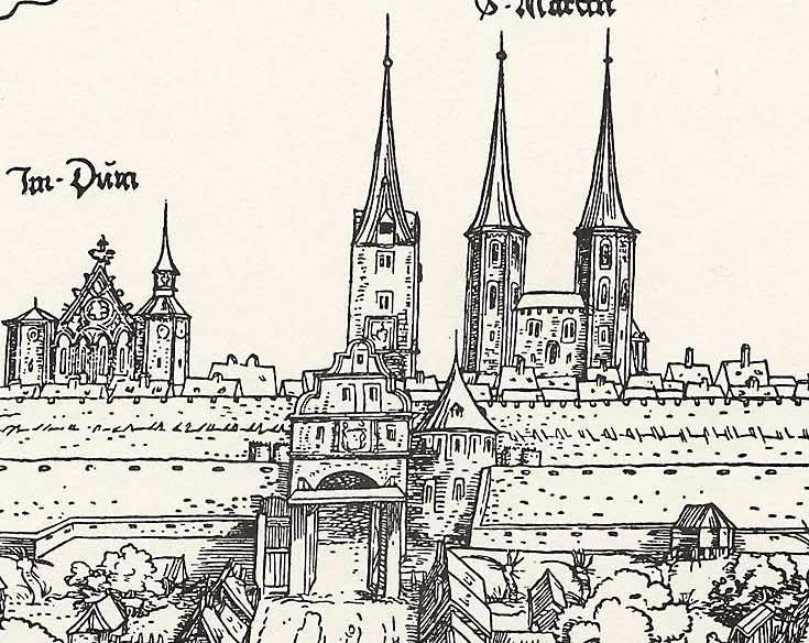 Das Hohe Tor in Braunschweig. Ausschnitt aus einer Stadtansicht von Peter Spitzer aus dem Jahr 1547.